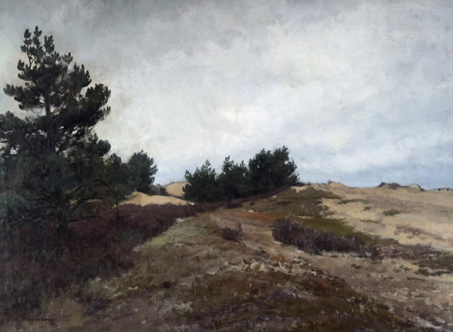 Zingster Heide. Öl, 57 x 77 cm.